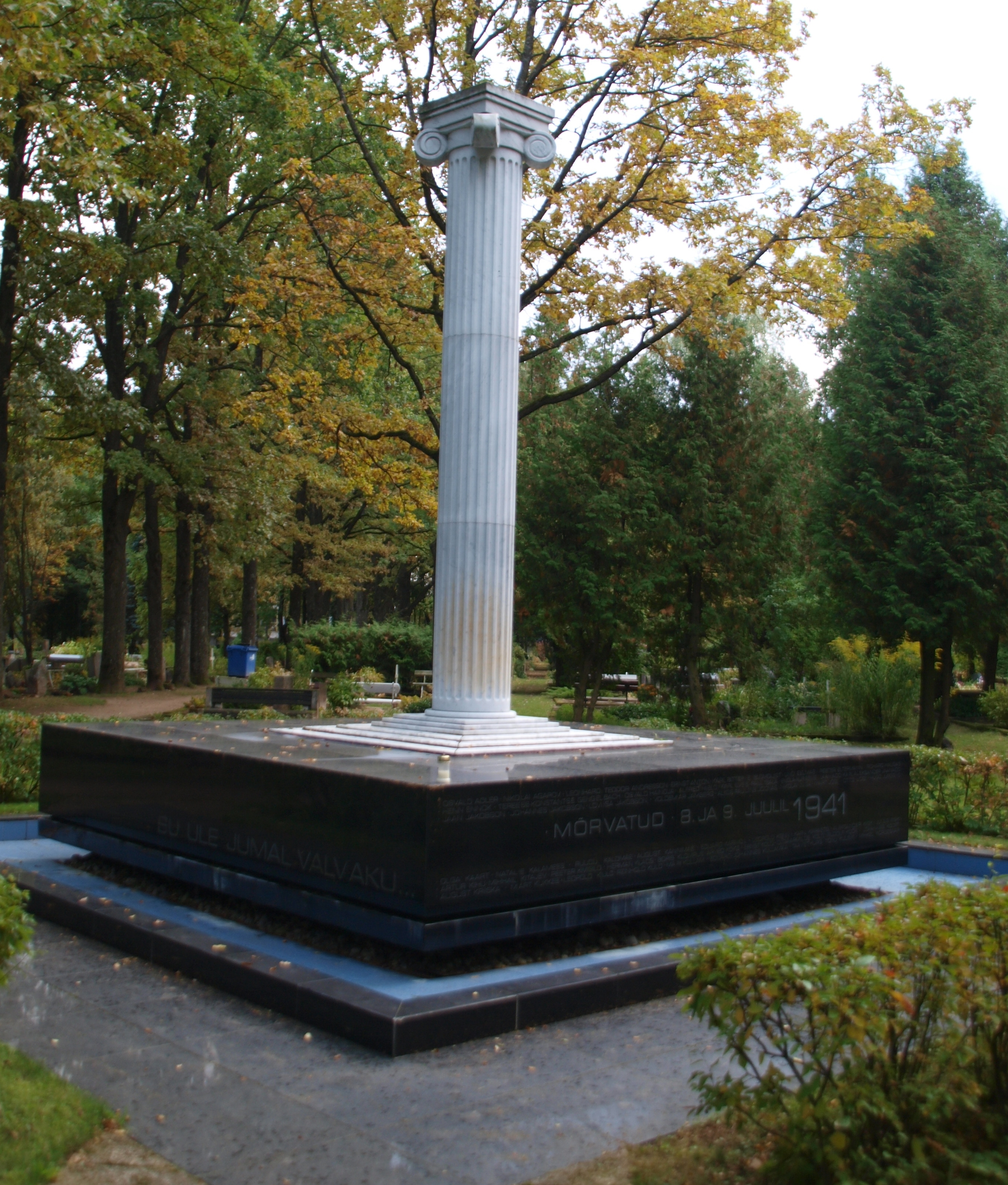 Terroriohvrite ühishaud